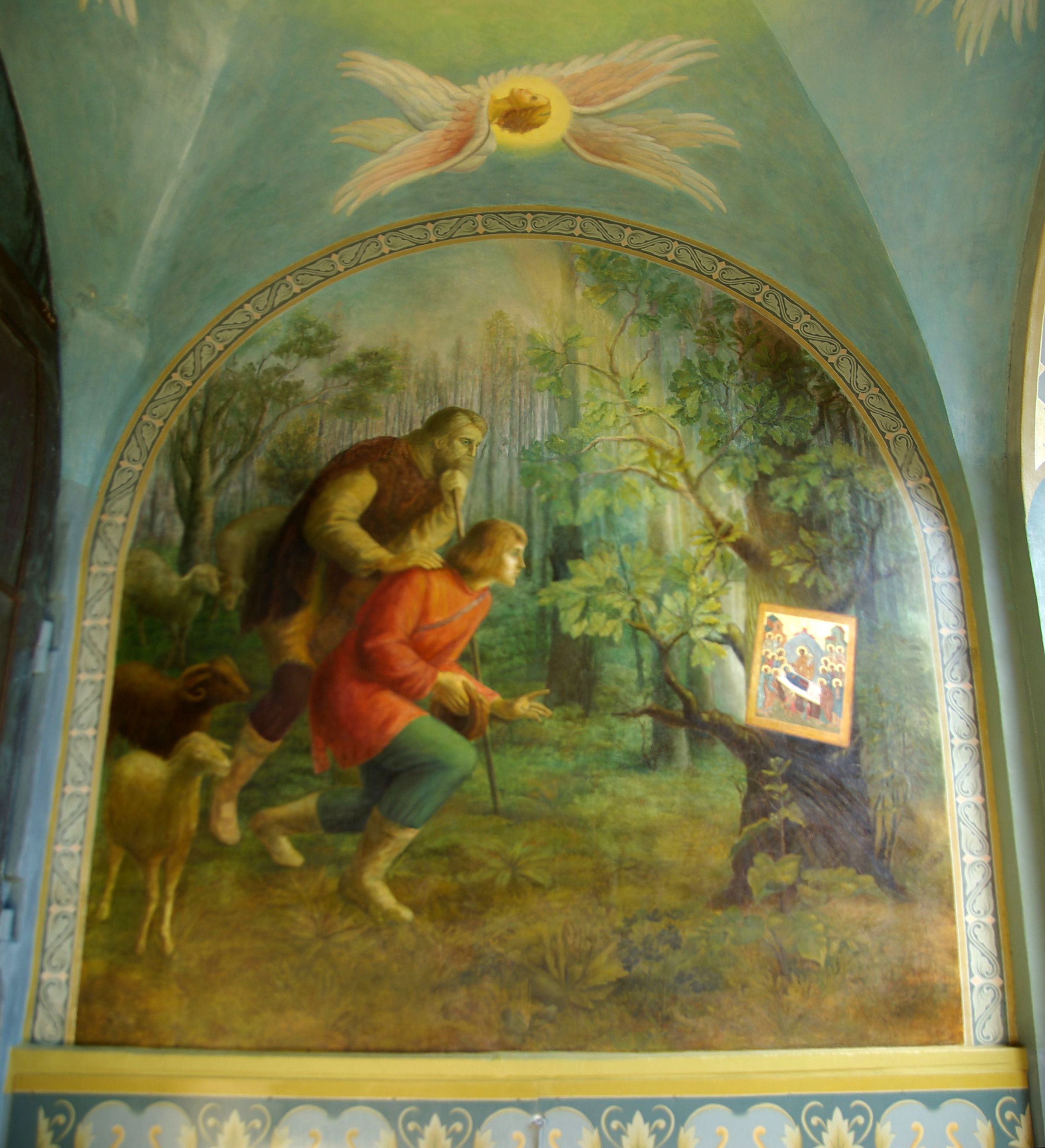 Ida-Viru maakond, Illuka vald, Kuremäe küla Pühtitsa klooster